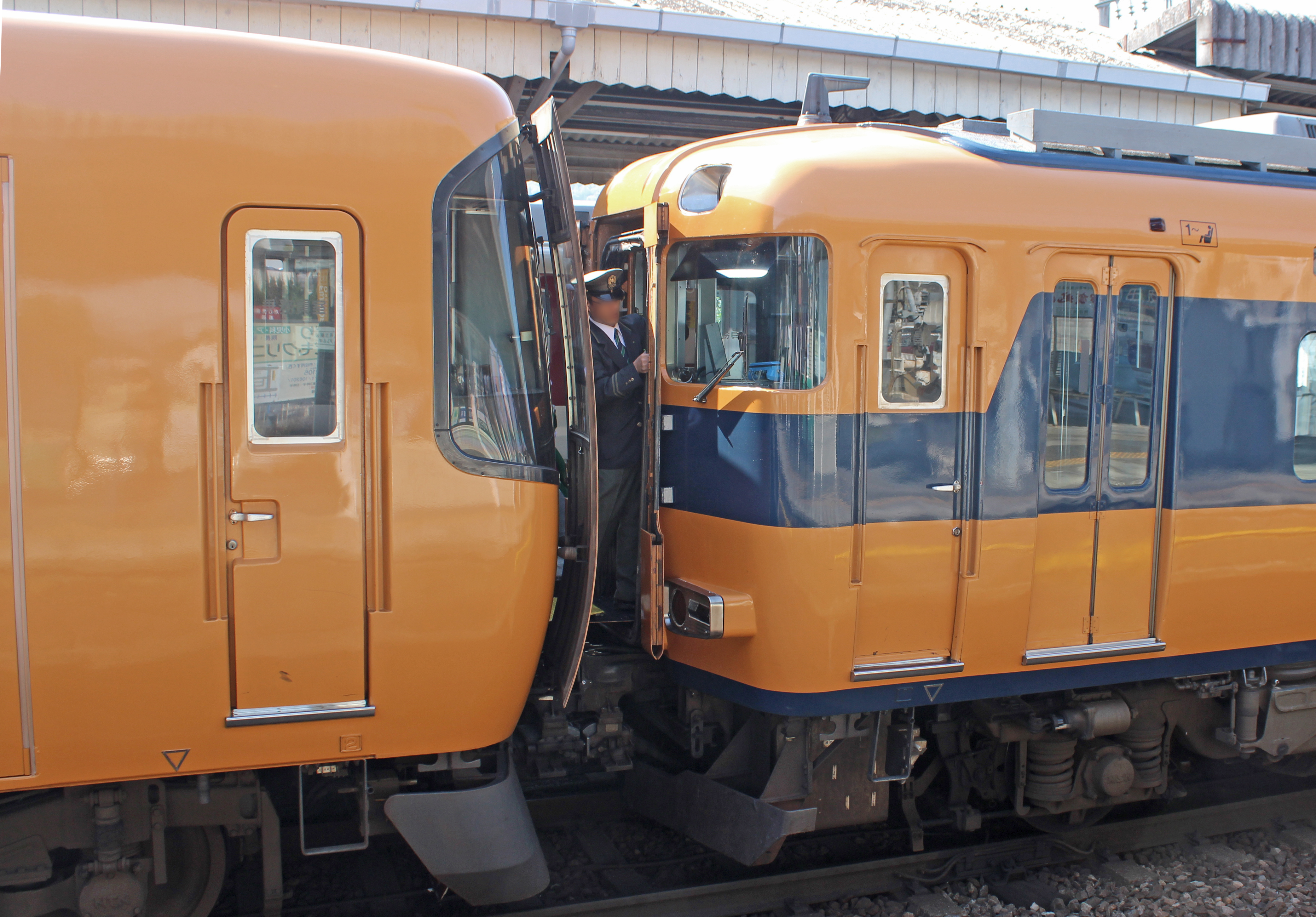 名張駅にて解結される近鉄特急